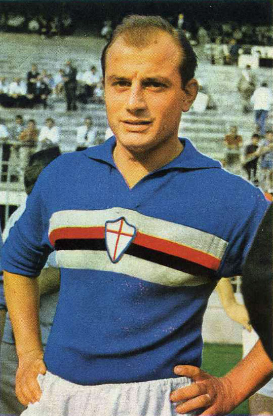 Il calciatore italiano Gaudenzio Bernasconi alla Sampdoria nella stagione 1961-62.